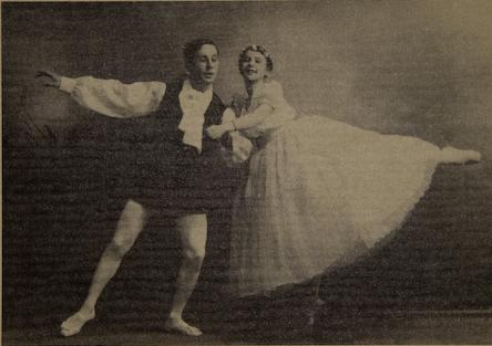 Toivo Niskanen (1887–1961) & Ja Margit Lilius (s. 1899); Chopin: Valssi 1917